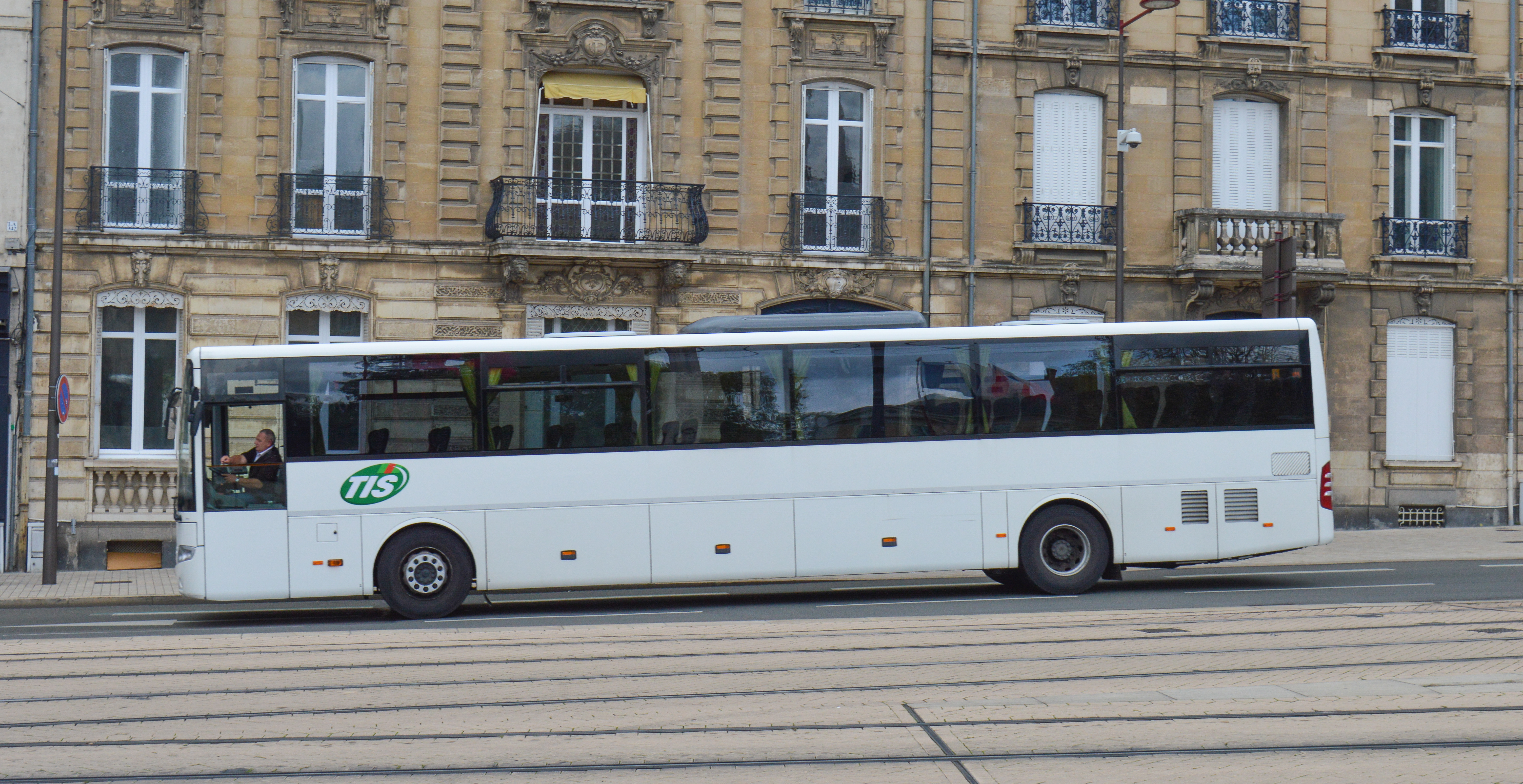 Vue latérale d'un Mercedes-Benz Intouro du réseau des Transports interurbains de la Sarthe en livrée simplifiée.